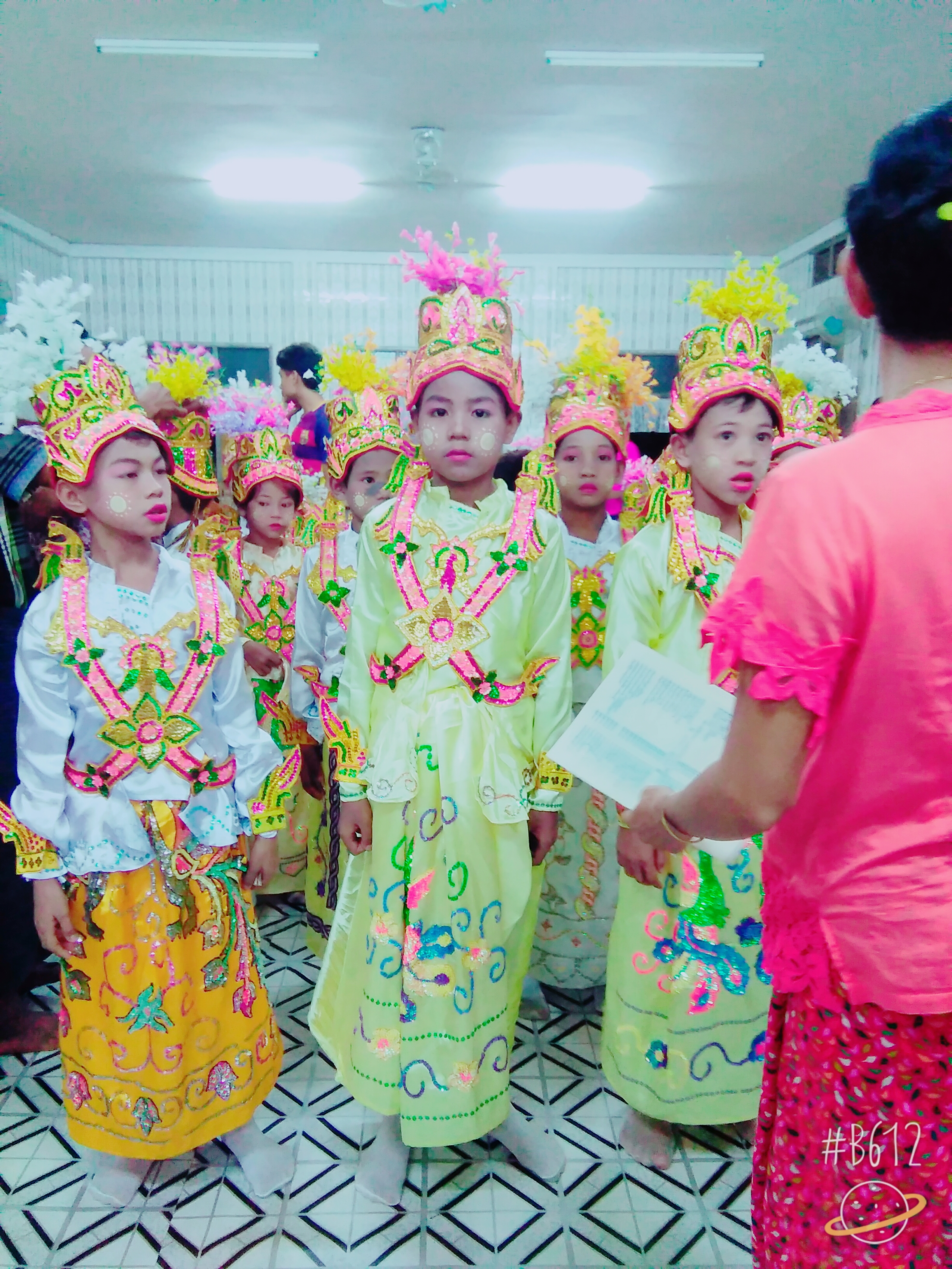 မောင်ရှင်လောင်း